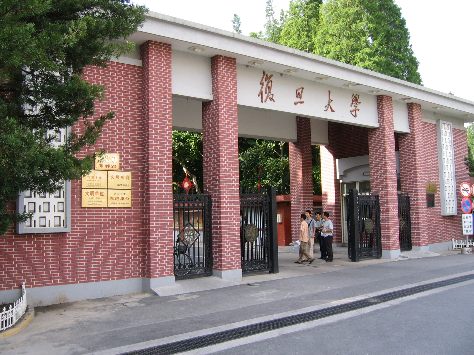 复旦大学校门 Gate to Fudan Campus, Shanghai, China